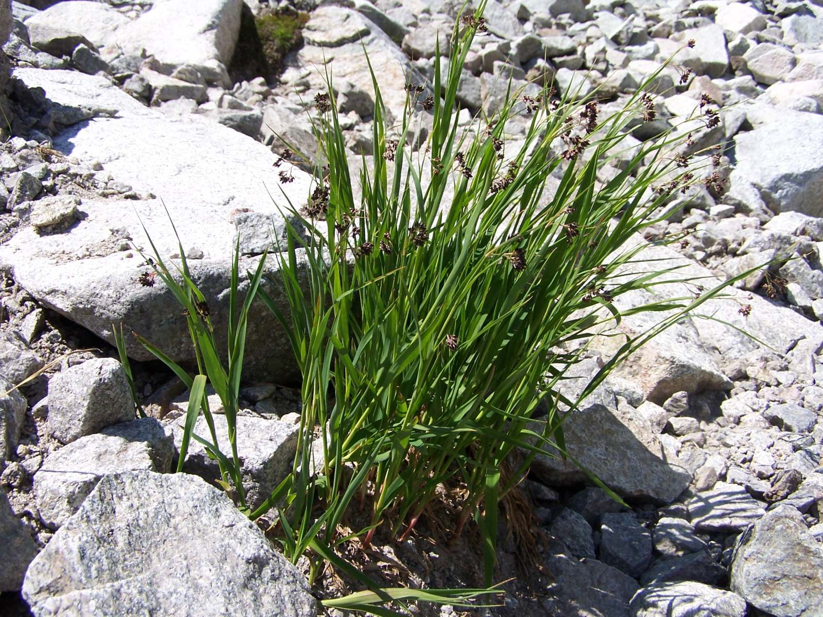 Luzula spadicea (pl. kosmatka brunatna), habitat: Tatra Mountains, Dolina Pańszczyca